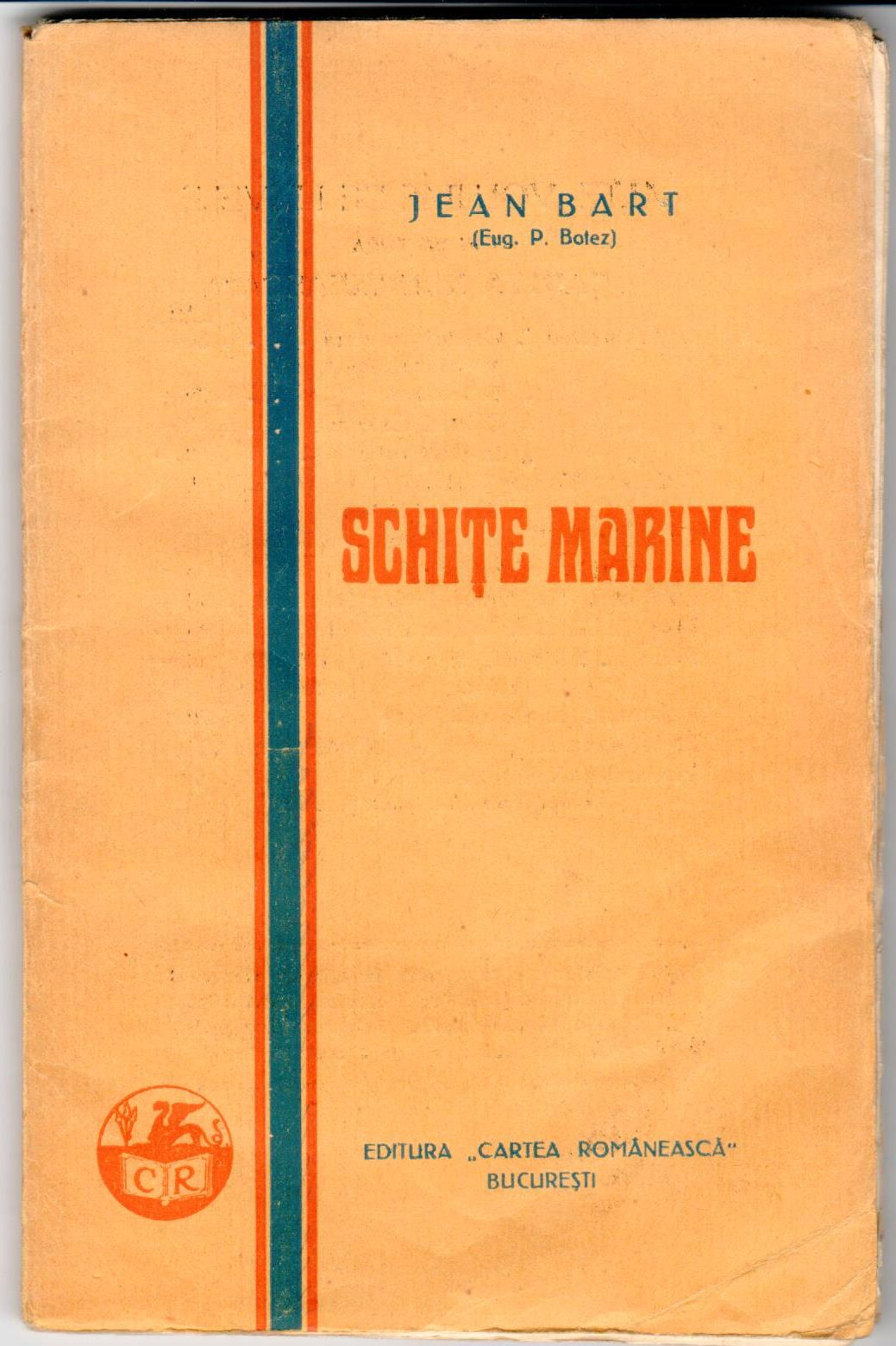 Coperta editia I, 1928